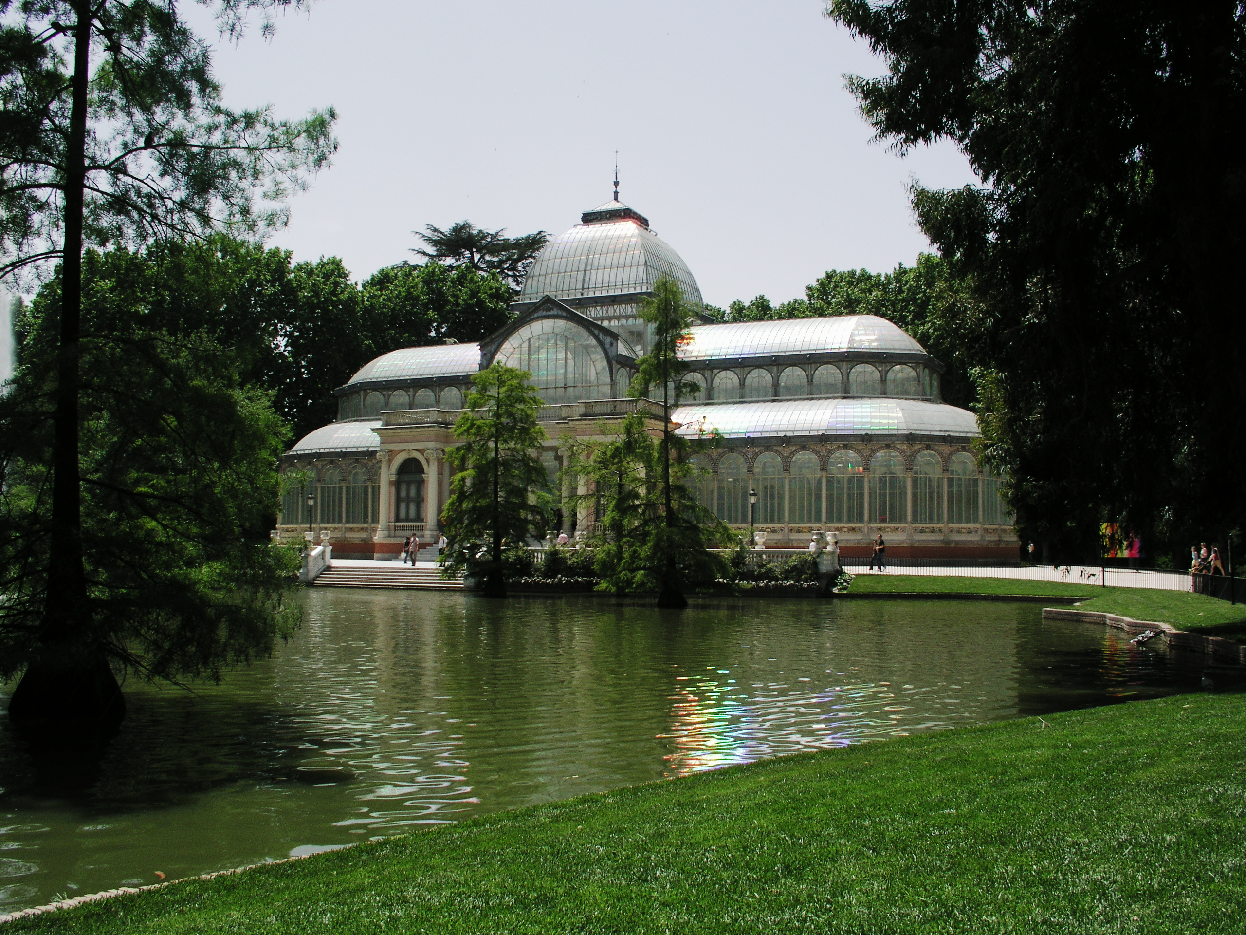 Palacio de Cristal, Parque del Buen Retiro, Madrid, Spain